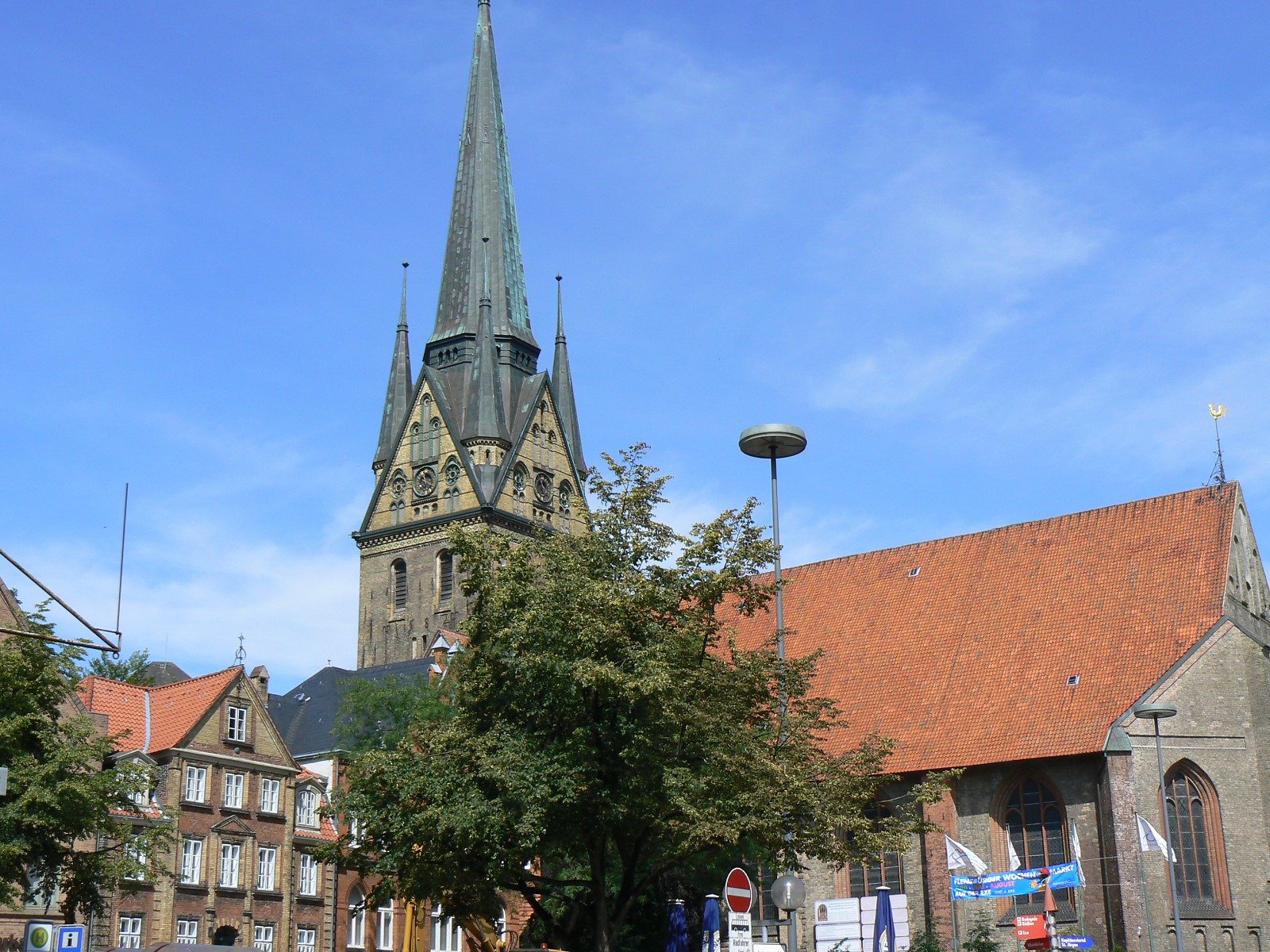 Nikolaikirche auf dem Südermarkt in Flensburg.